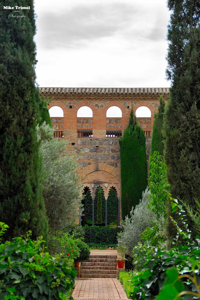 Vista del Palacio de Galiana desde la Senda Ecológica del Tajo